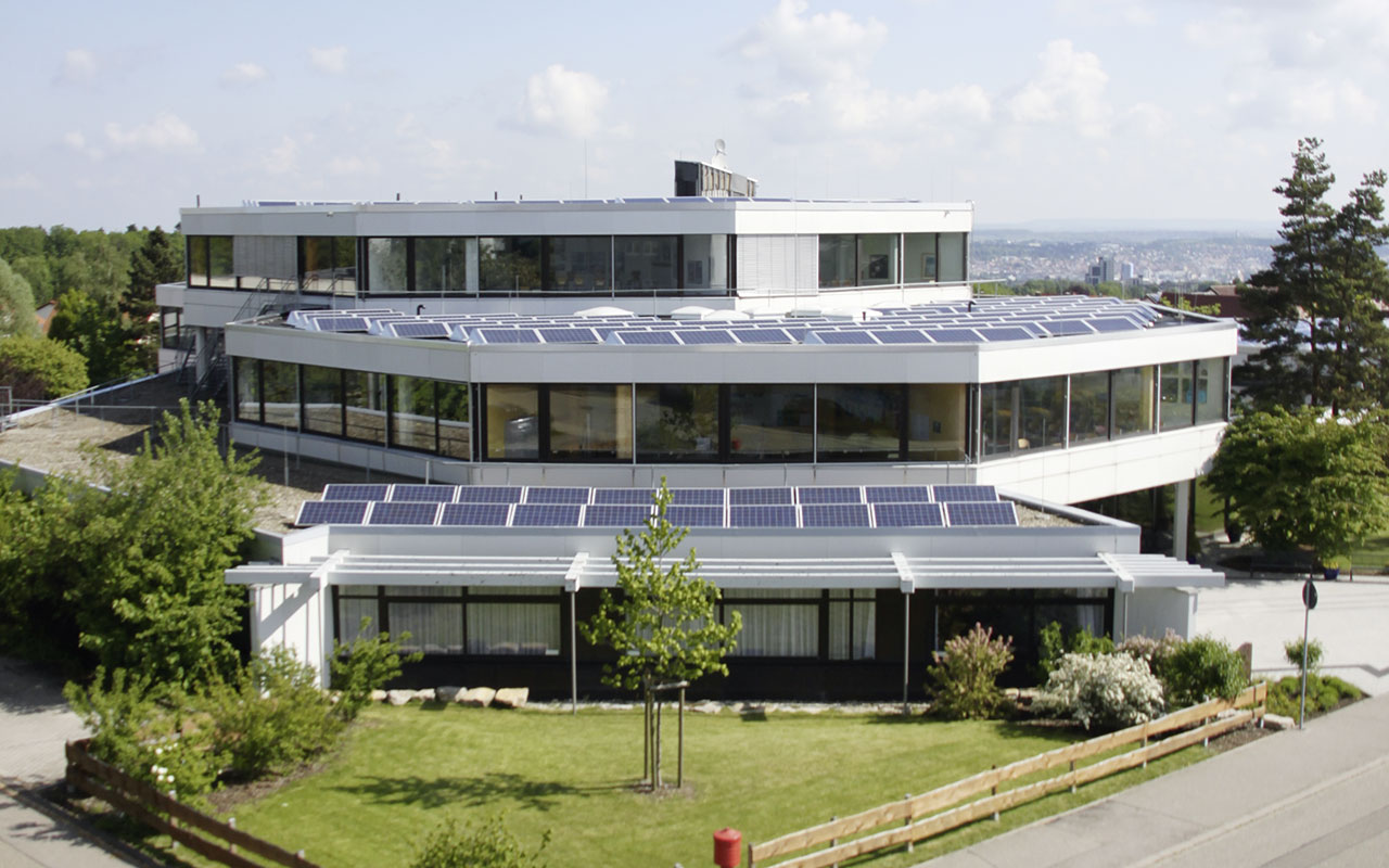 Aussenansicht Schiller-Gymnasium Pforzheim